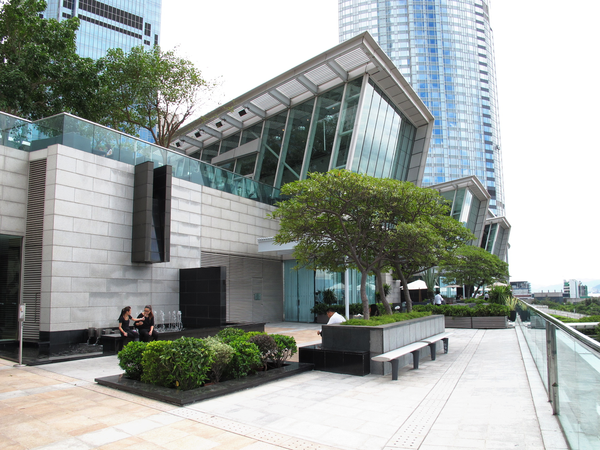 ifc mall Level 3 Garden